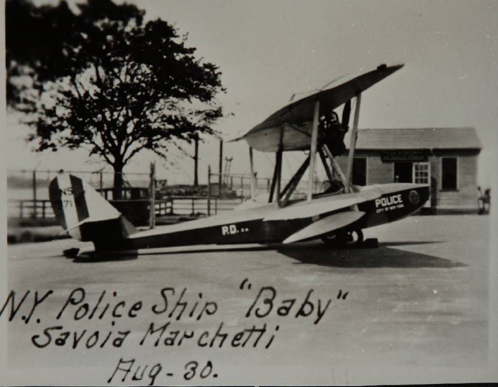 Aereo Savoia Marchetti S.56 USA